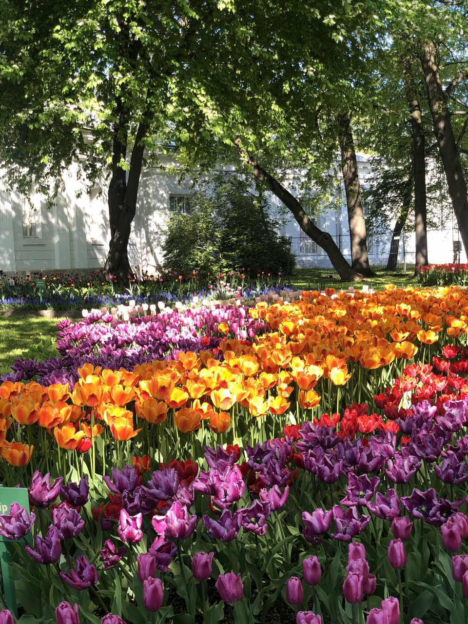 Цветы в саду Елагиного острова